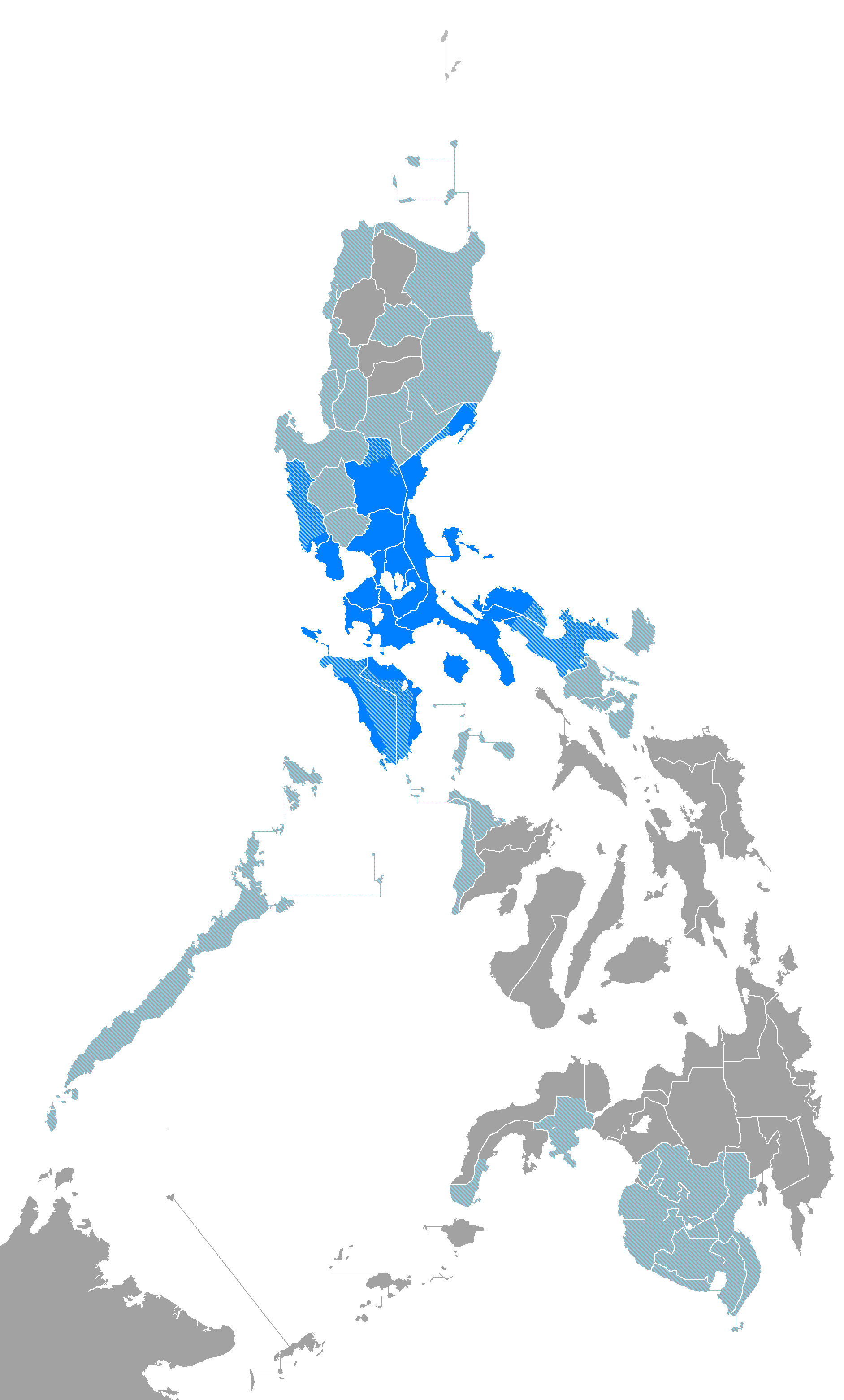 Idioma tágalo